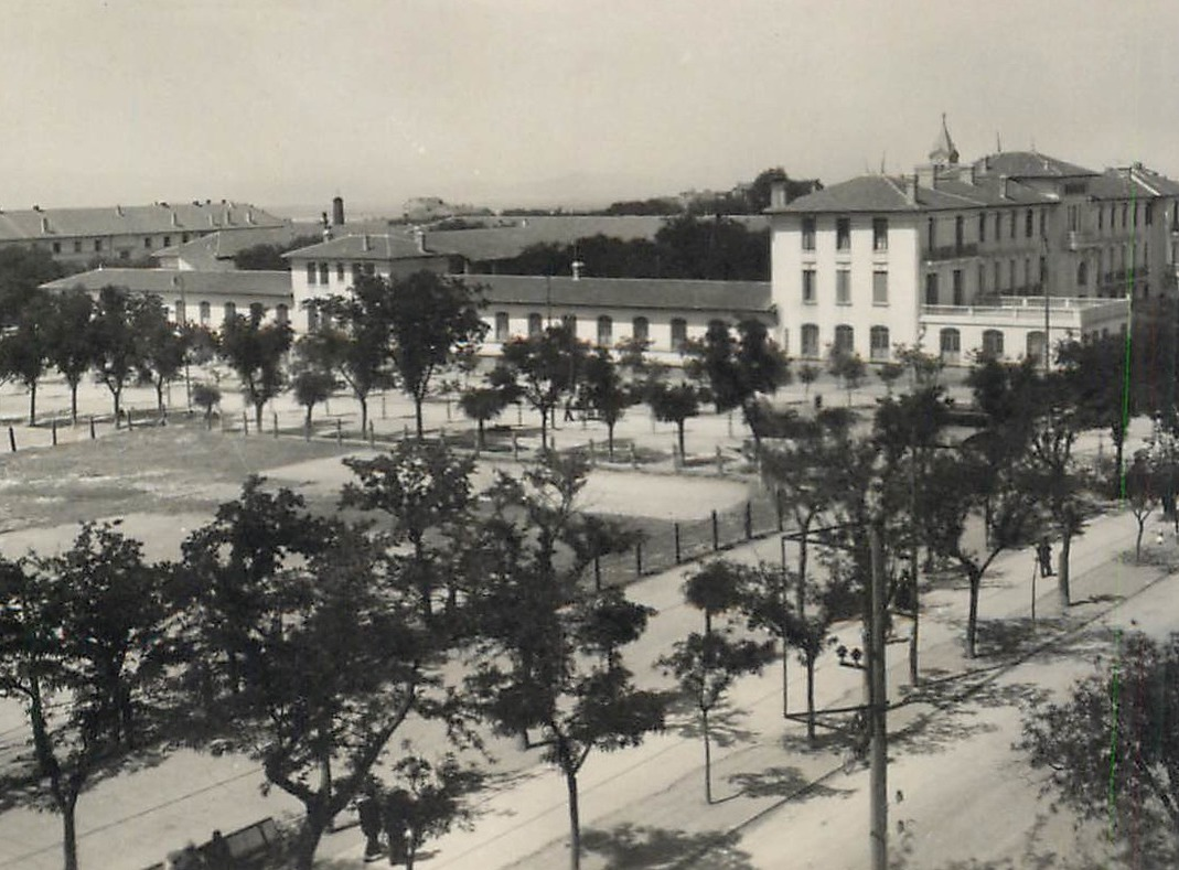 Sétif, lycée et collège, années 1950